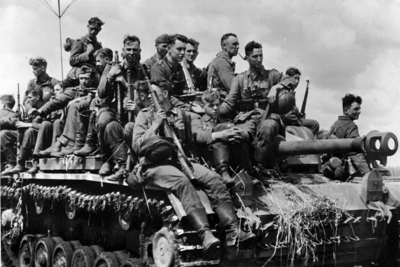 Russland, Grenadiere auf Sturmgeschütz ADN-ZB/Archiv II.Weltkrieg 1939- 45 An der Front in der Sowjetunion, Schlacht im Kursker Bogen im Juli-August 1943 Während eines Angriffs faschistischer deutscher Truppen Anfang Juli 1943 dringen Sturmgeschütze mit aufgesessenen Grenadieren der Division "Grossdeutschland" gegen sowjetische Stellungen vor. (Kempe) 3546-43 [Kämpfe bei Belgorod - Orel]